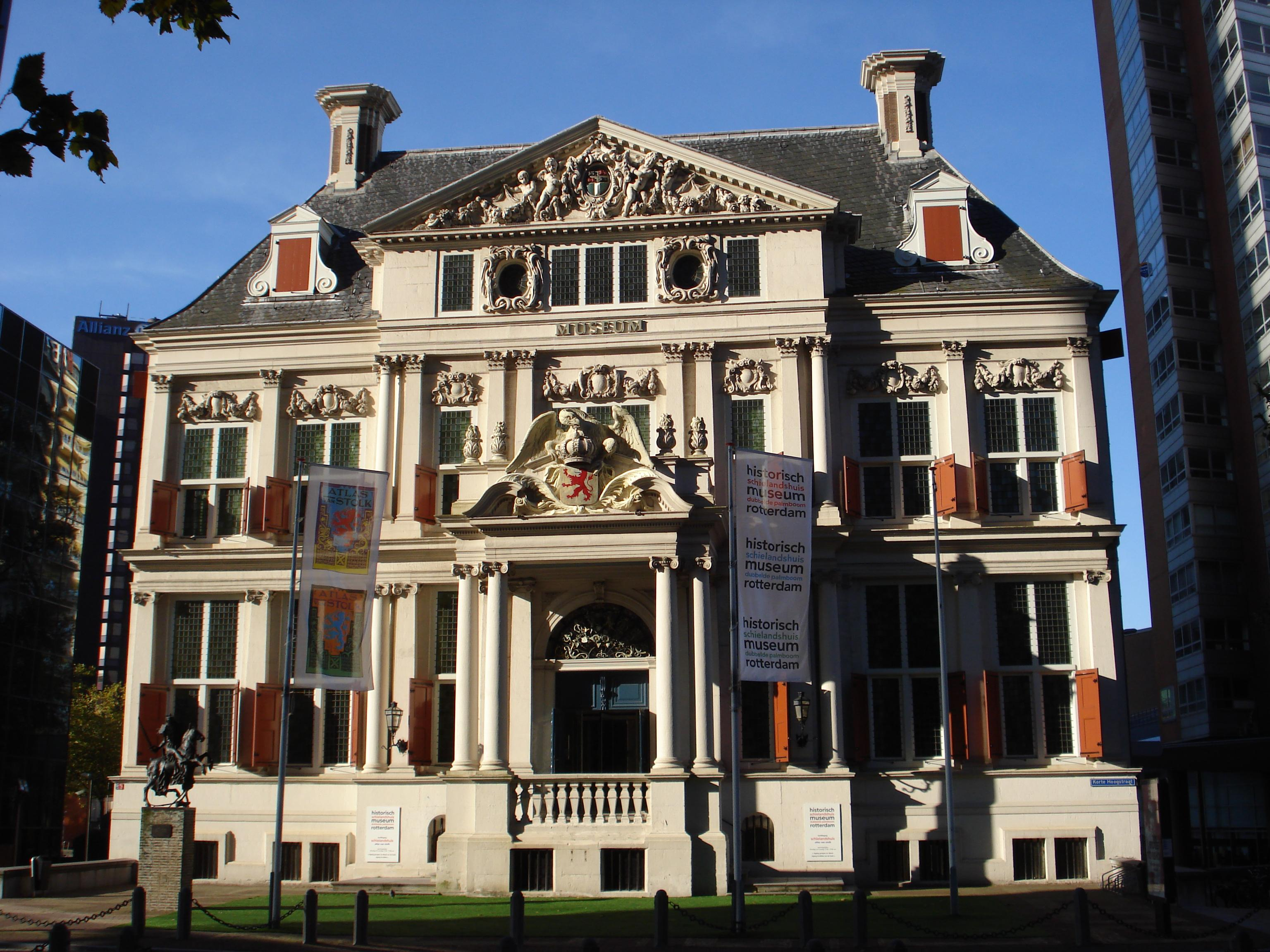 Rotterdam, Schielandshuis. Rijksmonument.